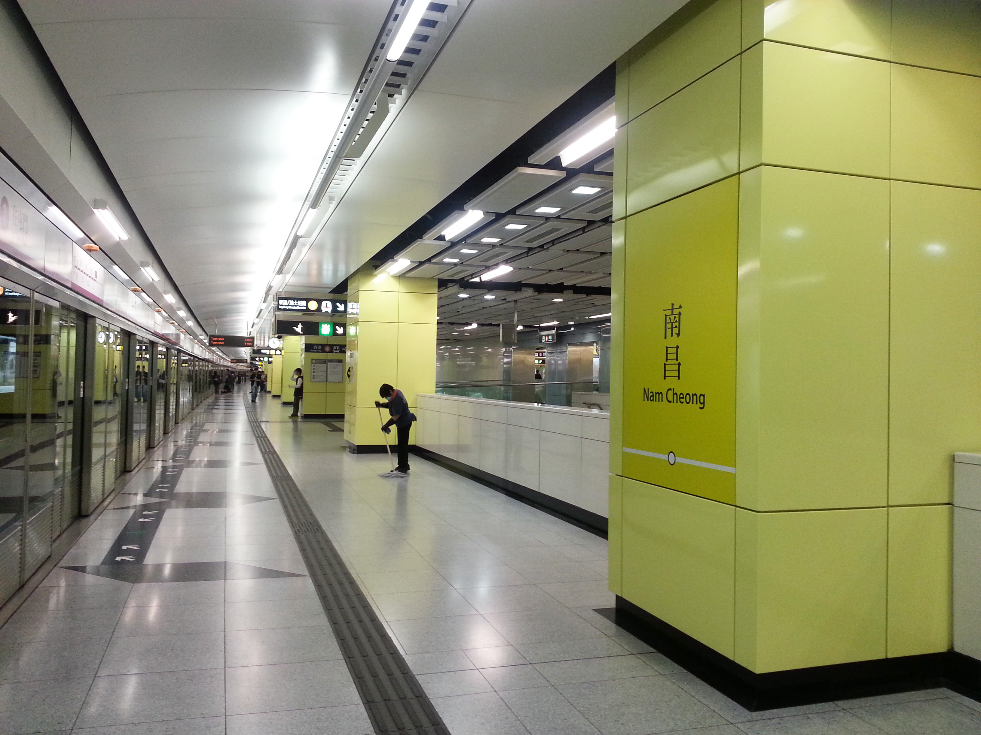 港鐵南昌站西鐵線月台